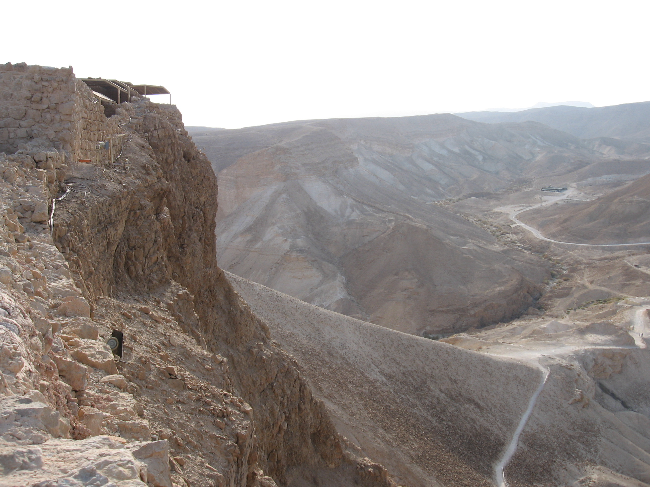 Die von den Römern angelegte Rampe in Massada